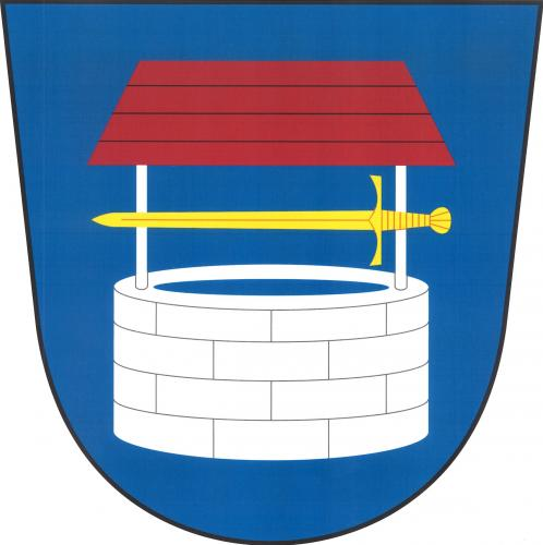 Znak obce Stará Voda